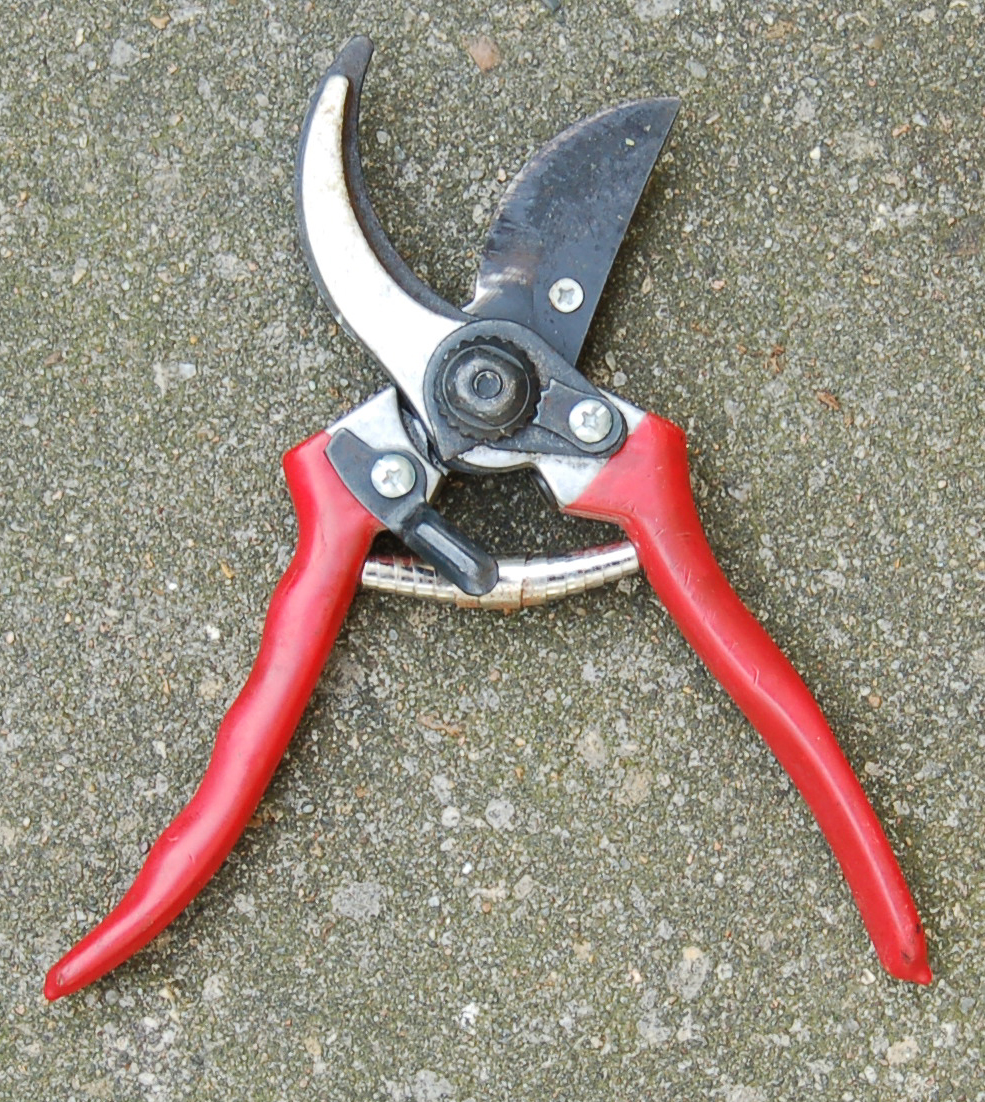 Open secator - Secateur ouvert